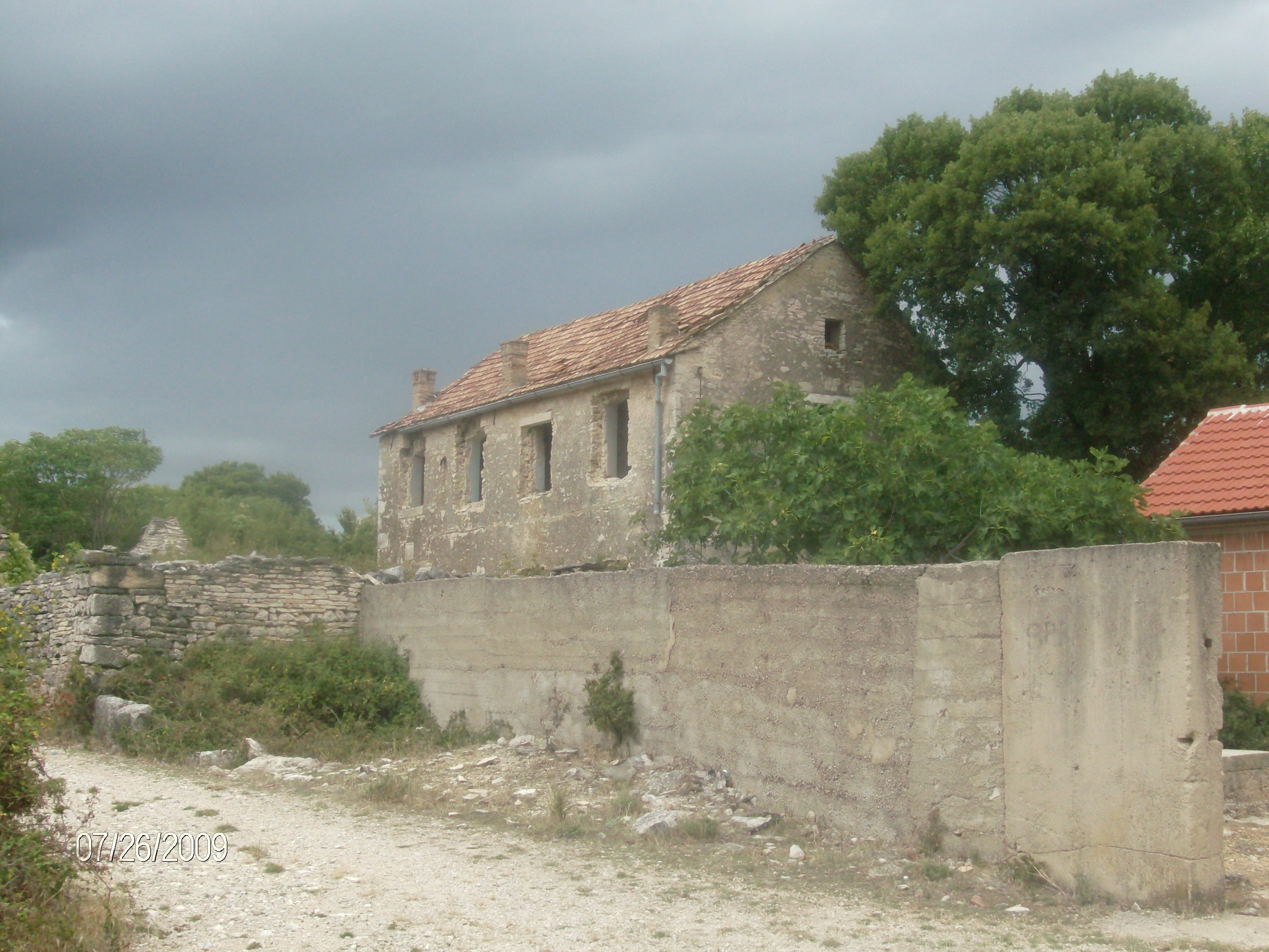 Bjelina, Škola